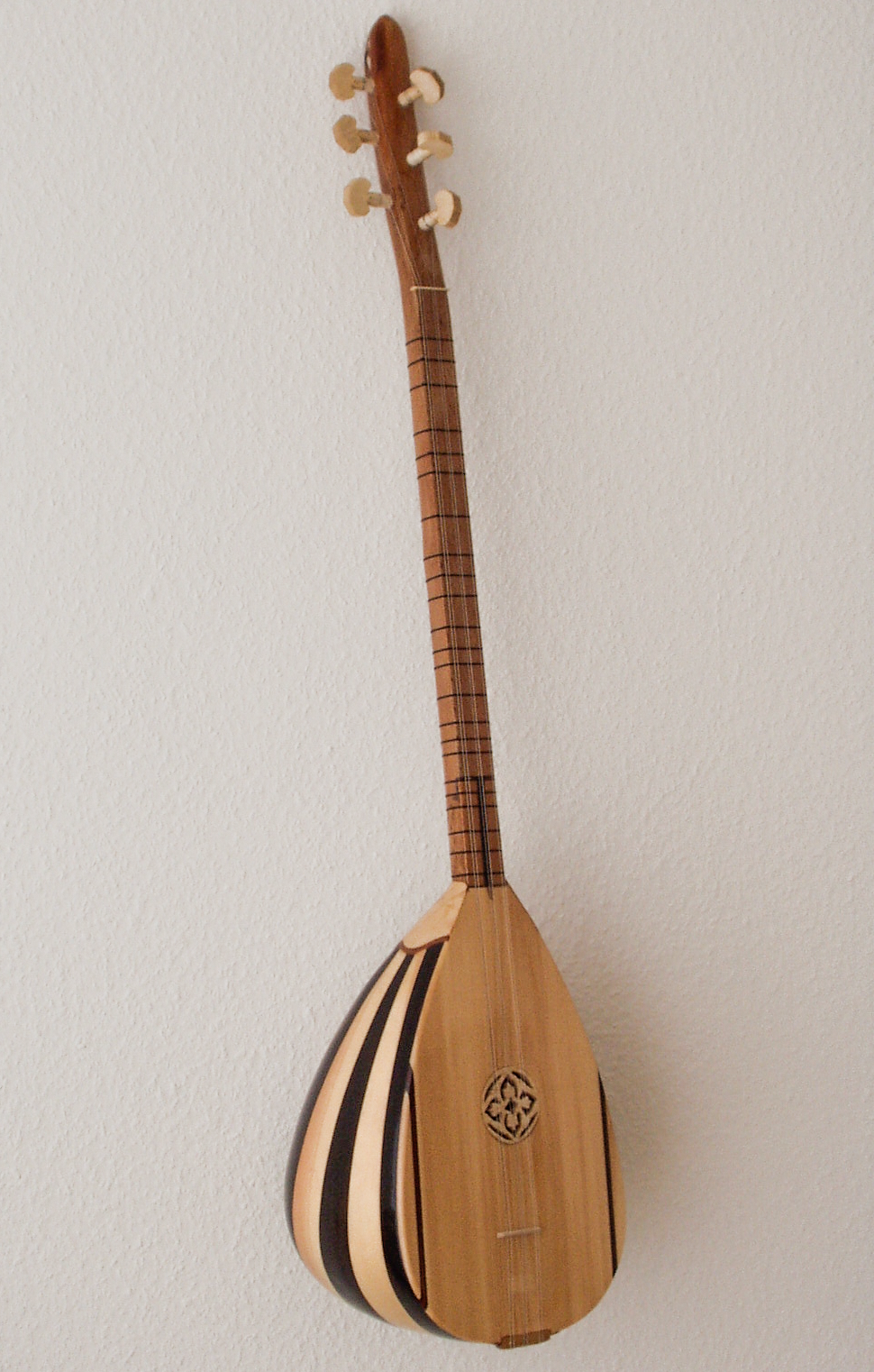 Cura